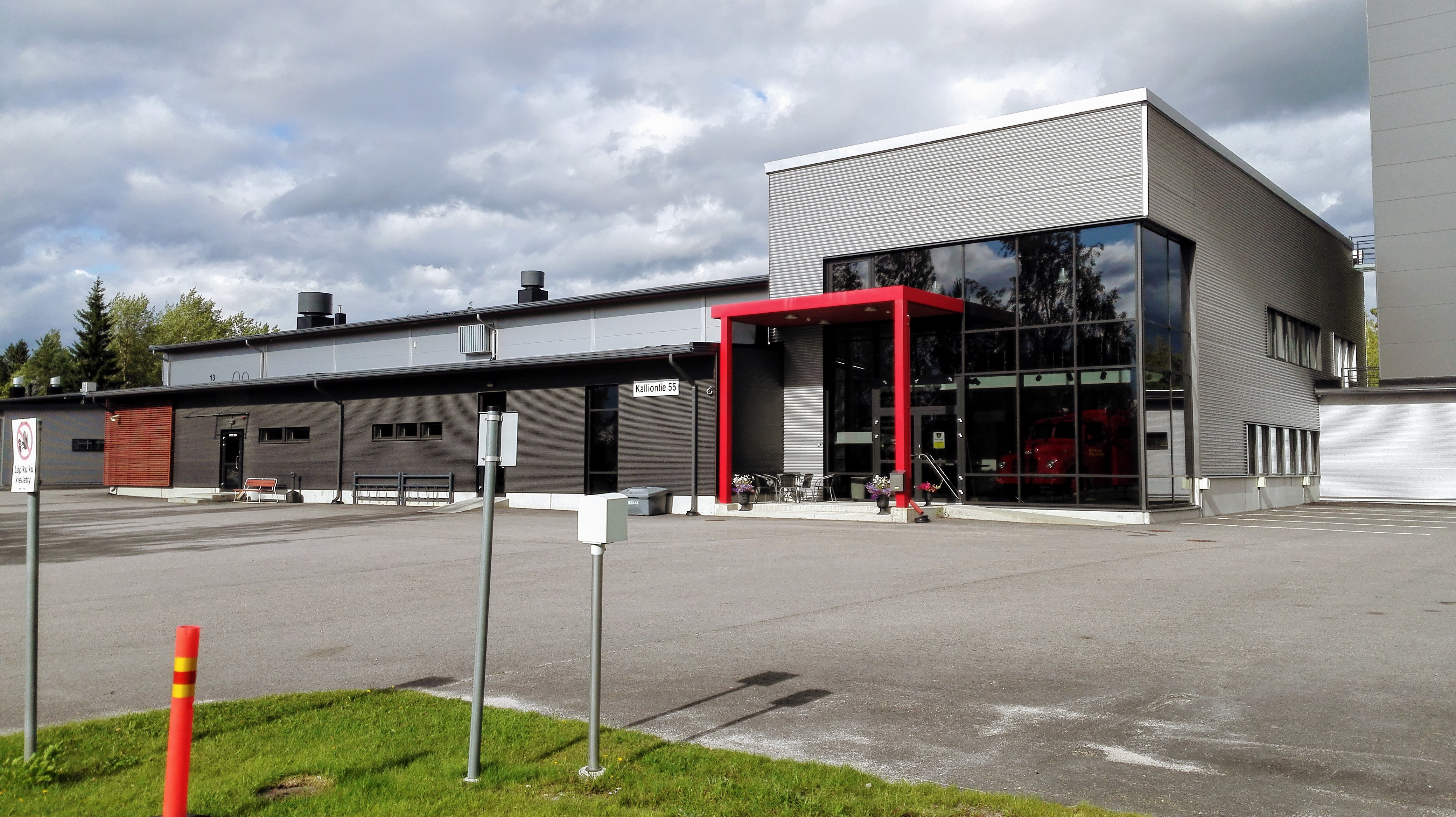 Nivalan pelastuslaitos etupihalta kuvattuna elokuussa 2017.